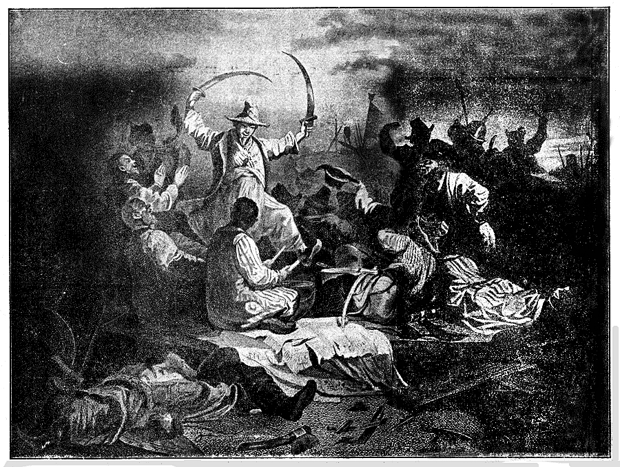 Татары, пирующие после битвы на Калке (с картины академика Н. Кошелева). Это изображение было использовано для иллюстрирования статьи «Калка» опубликованной в одиннадцатом томе «Военной энциклопедии», который был издан книгоиздательским товариществом И. Д. Сытина в 1913 году в столице Российской империи городе Санкт-Петербурге.